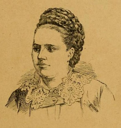 Portrait de la chanteuse Rosa Bordas âgée de 38 ans.